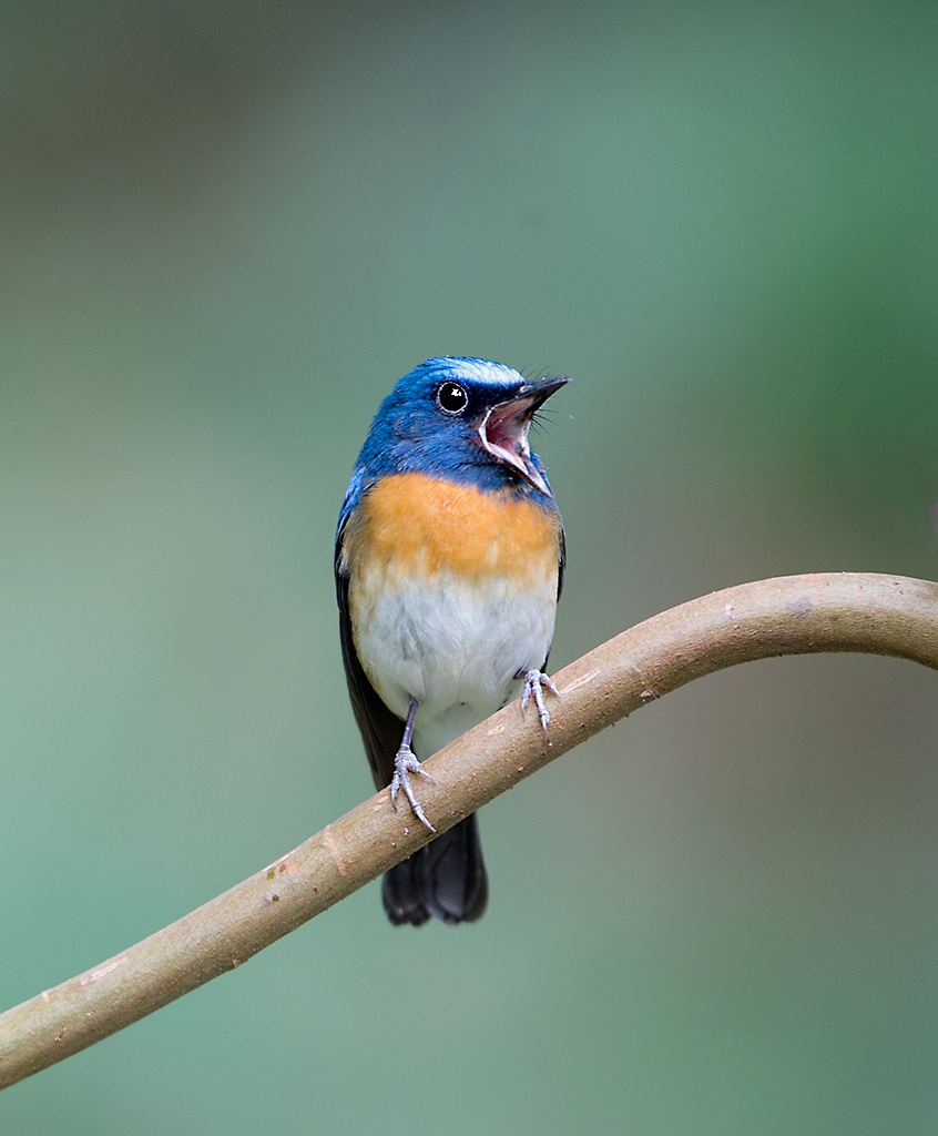 Thattekkad, Kerala